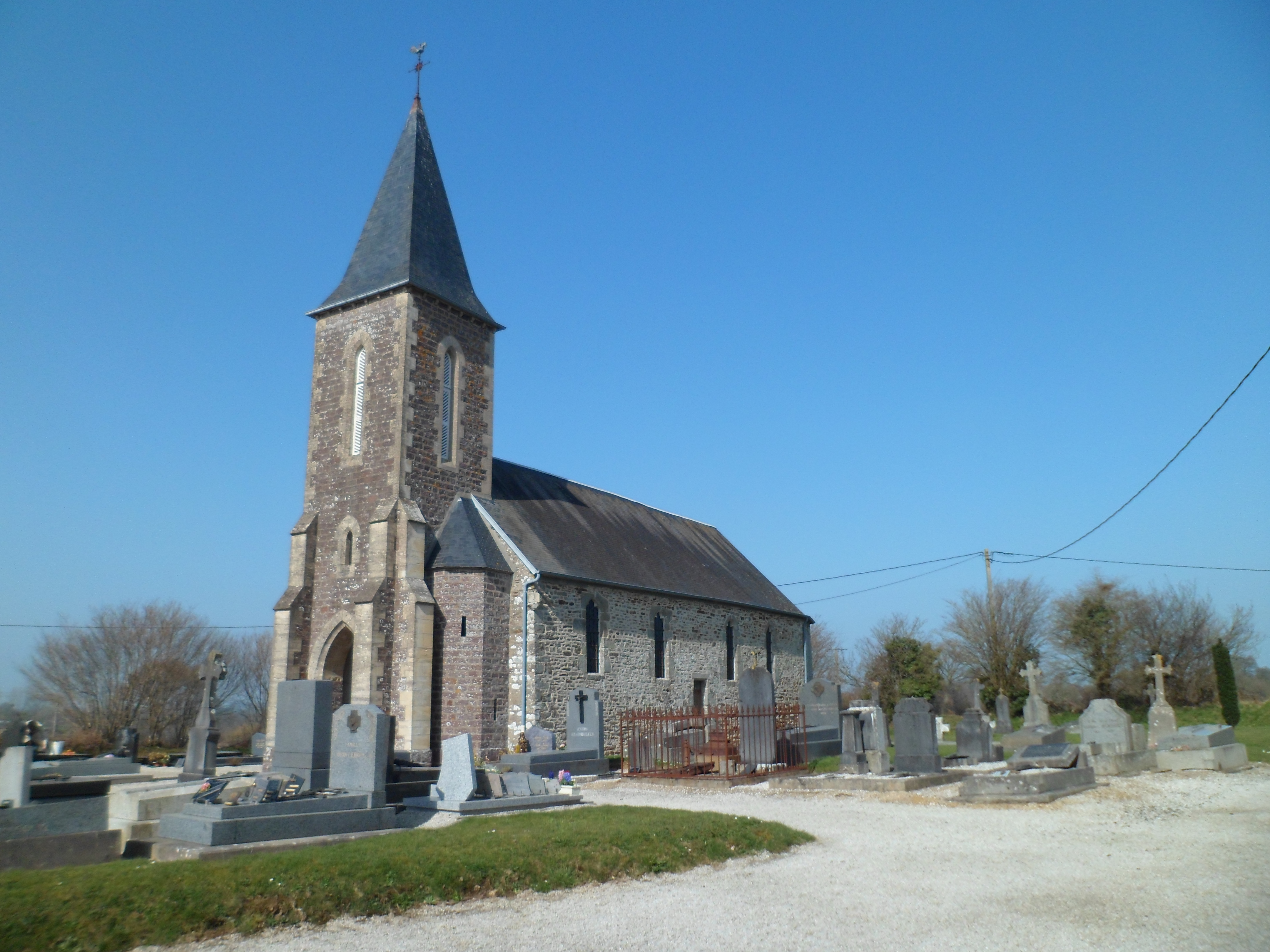 Église Saint-Nicolas de la Haye-Bellefond